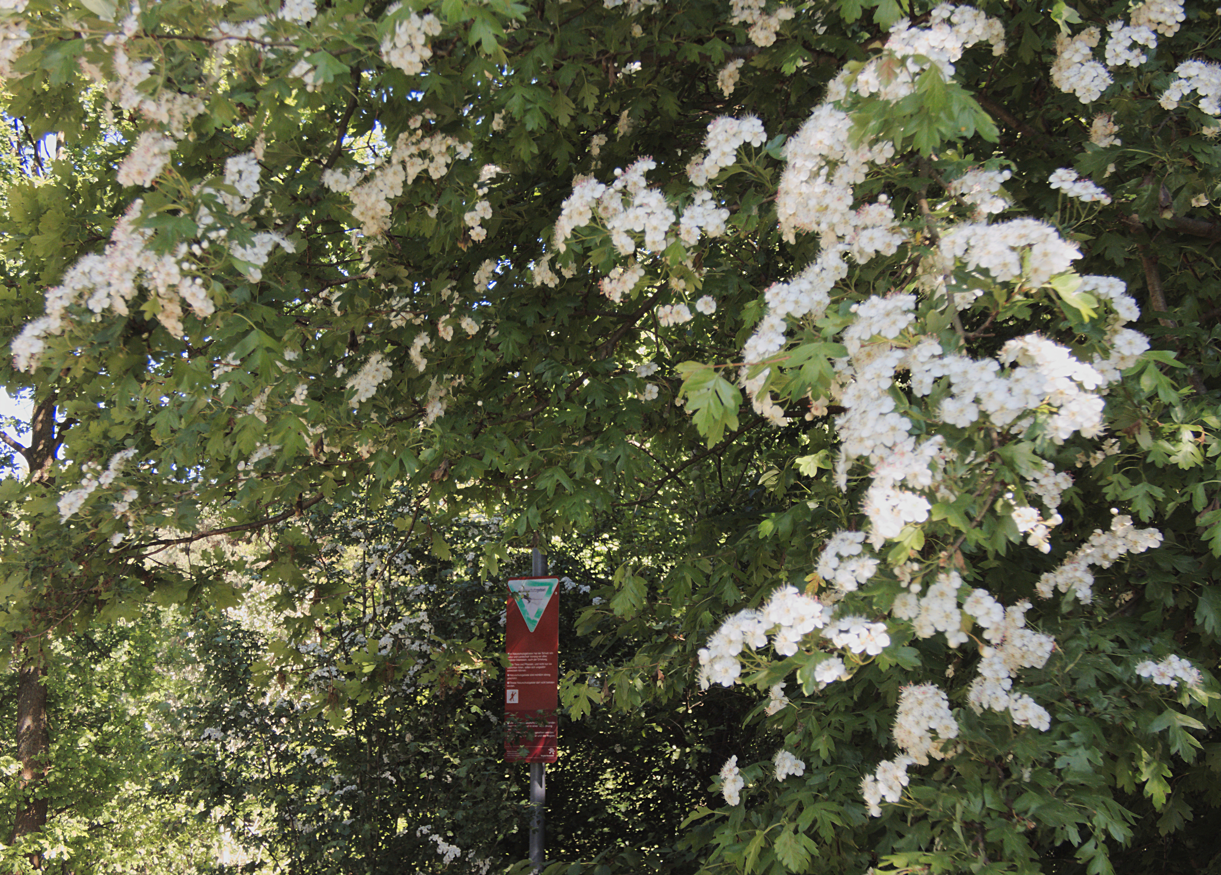 Das Naturschutzgebiet Ricklinger Entenpool bei Schloß Ricklingen wird durch ein vielfältiges Nebeneinander unterschiedlicher Lebensräume geprägt. So finden sich Stillgewässer, Erlenbrüche, Gebüsche und naturnaher, von Eichen dominierter Wald sowie Feuchtwiesen.